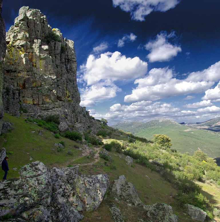 Cabañas del Castillo, provincia de Cáceres, España.